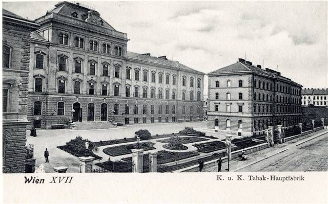 Ansichtskarte der Tabakfabrik Ottakring von 1905. Zu sehen ist die Fassade des Hauptgebäudes mit davorliegendem ausgestalteten Park. Am linken Bildrand und im rechten Bildteil sind die beiden Nebengebäude auf Seiten der Thaliastraße zu sehen.